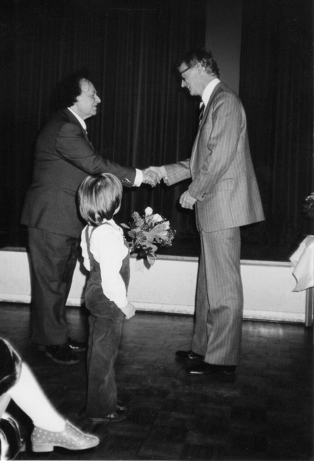 Michael Goldstein und Hauptpastor Carl Malsch bei einer Preisverleihung in St. Petri Hamburg